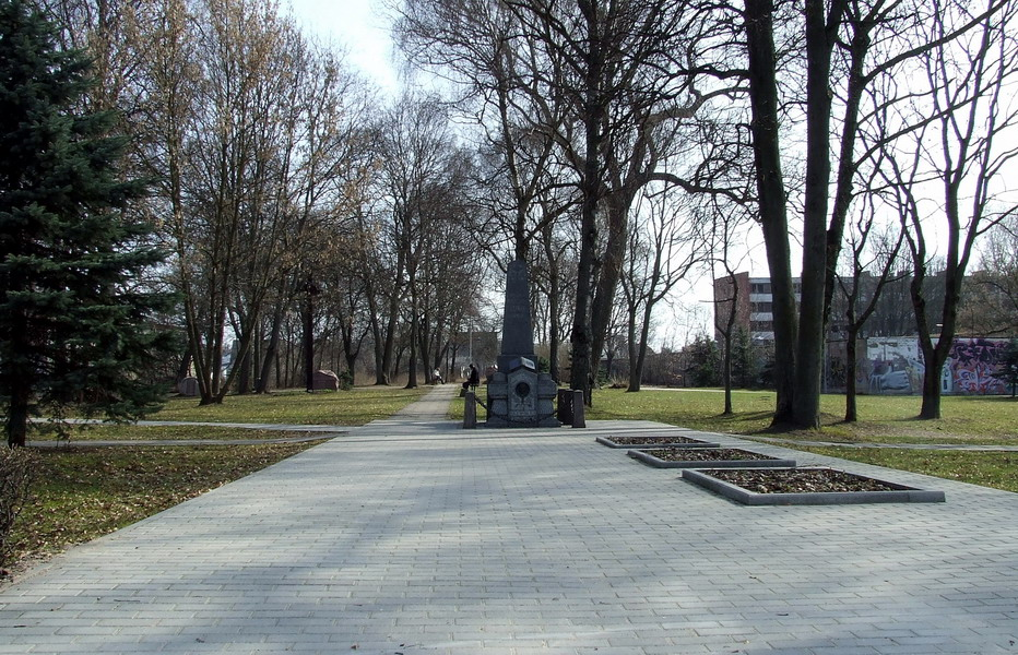 Jeronimo Ralio kapas Ramybės skvere, Jonavoje.